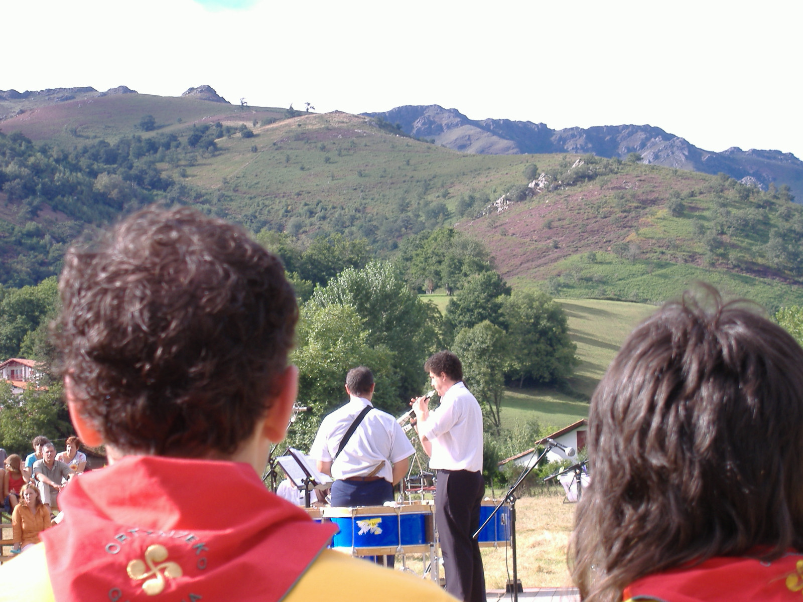 Fetes d'Ossès 2006